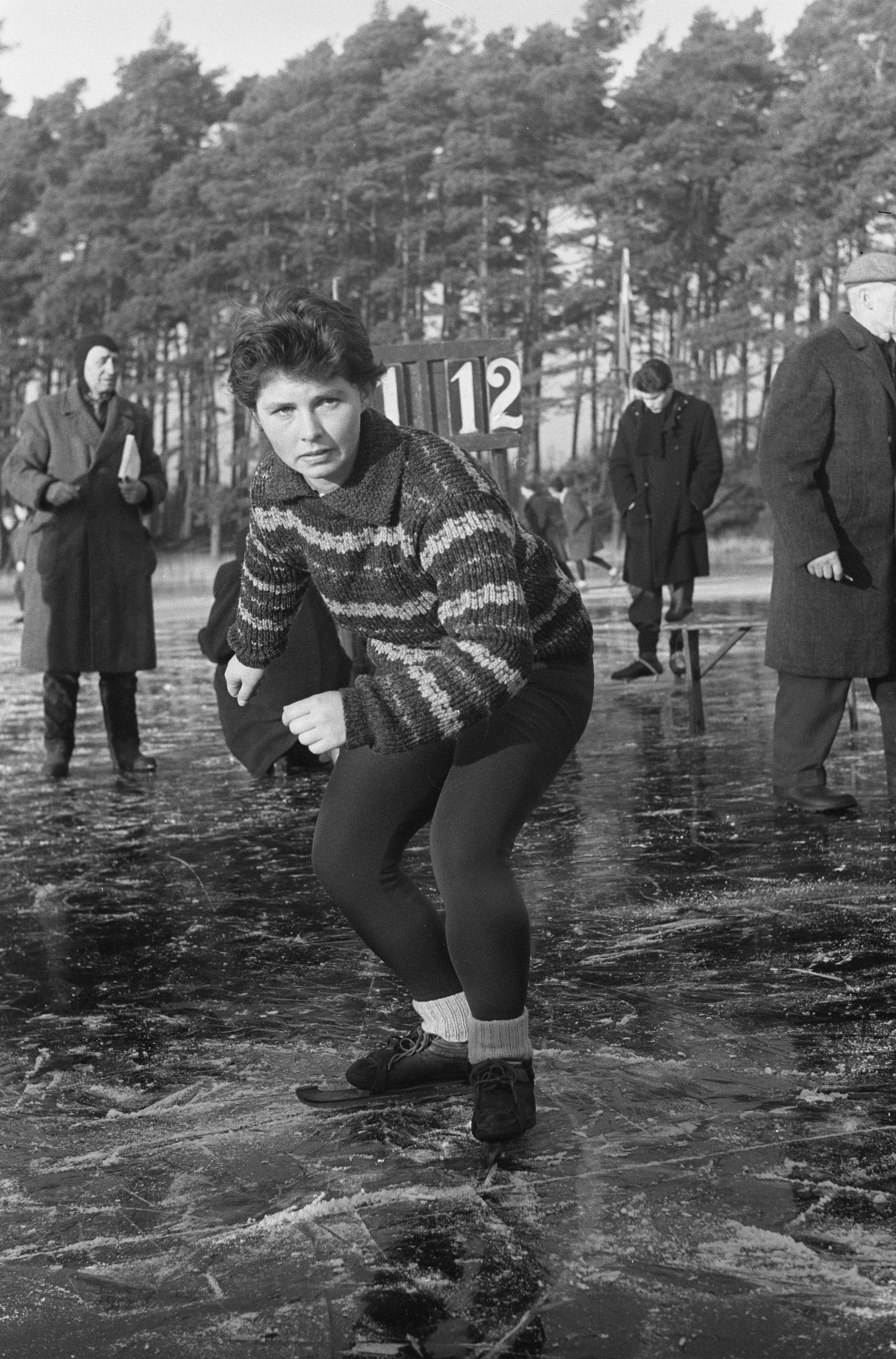 Collectie / Archief : Fotocollectie Anefo Reportage / Serie : [ onbekend ] Beschrijving : Hardrijderijen voor vrouwen in Beersterzwaag. Martha Wieringa Datum : 18 december 1961 Locatie : Beetsterzwaag Trefwoorden : schaatsers Persoonsnaam : Wieringa, Martha Fotograaf : Pot, Harry / Anefo Auteursrechthebbende : Nationaal Archief Materiaalsoort : Negatief (zwart/wit) Nummer archiefinventaris : bekijk toegang 2.24.01.05 Bestanddeelnummer : 913-3040